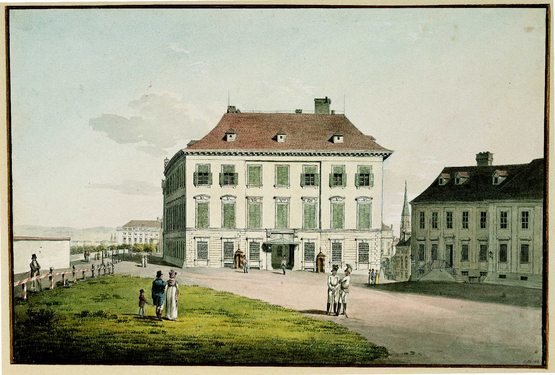 Jakob von Alt Das Palais Herzog Alberts mit der Augustinerbastei, 1816 Feder in Schwarz, aquarelliert Albertina, Wien